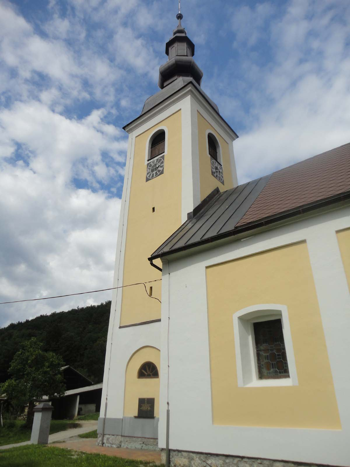 Cerkev v Kočevskih Poljanah